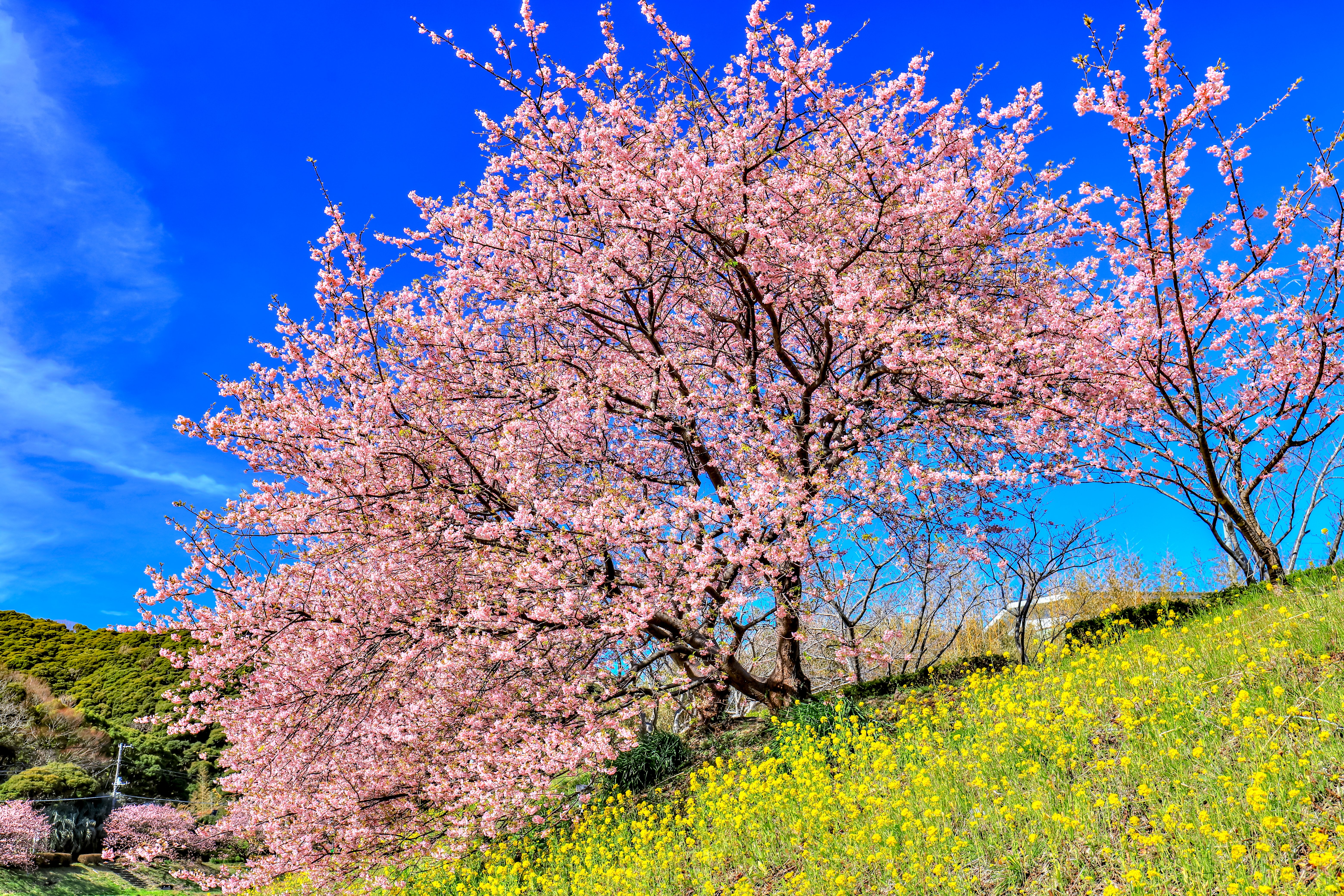 静岡県賀茂郡南伊豆町、みなみの桜、カワヅザクラ、菜の花